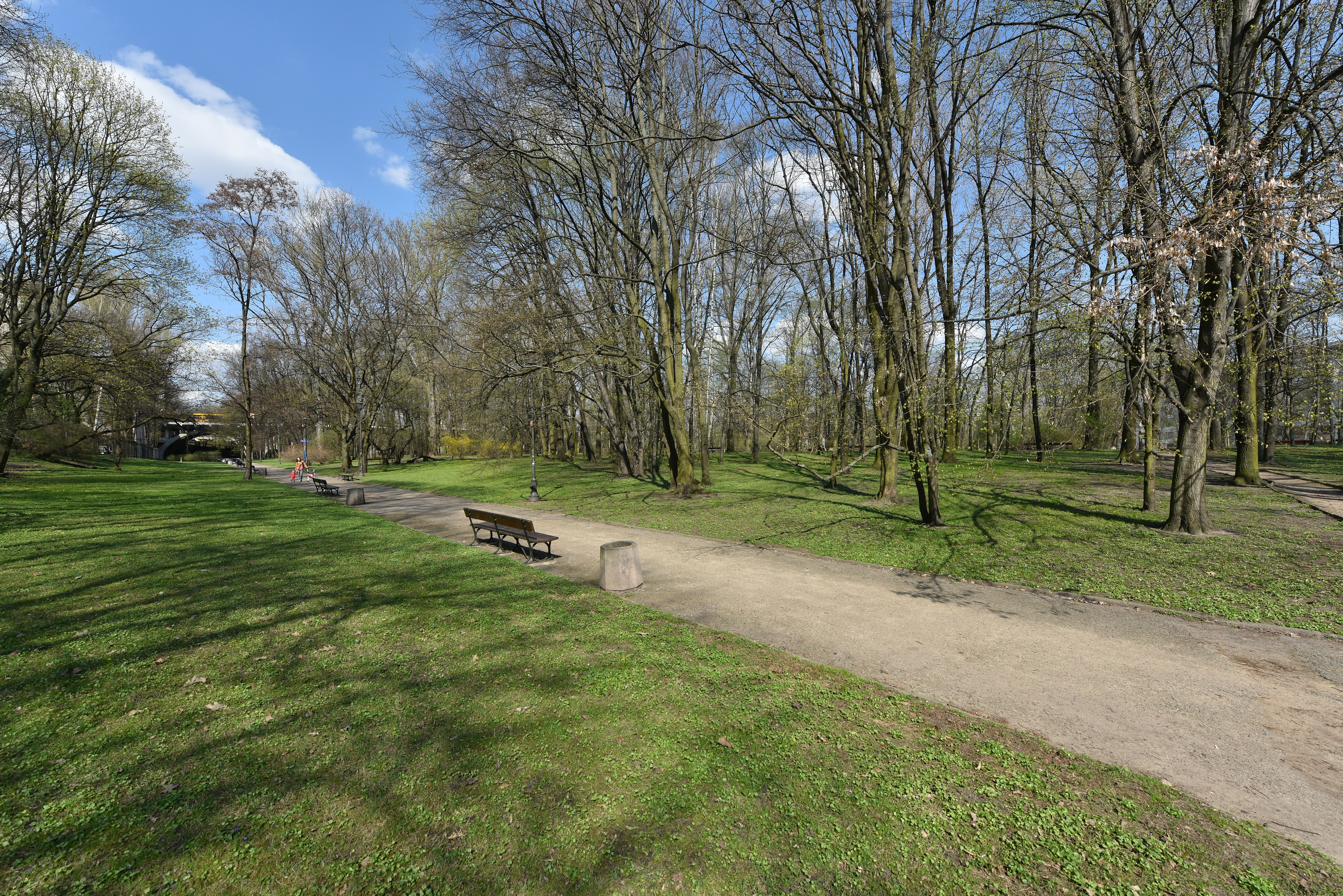 Park na Książęcem w Warszawie